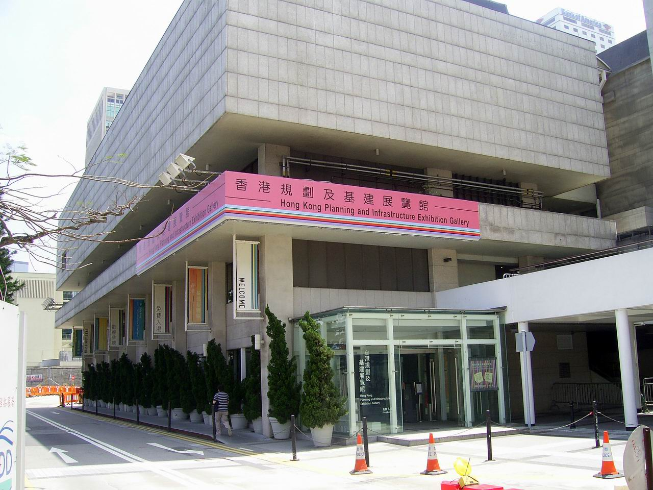 香港規劃及基建展覽館